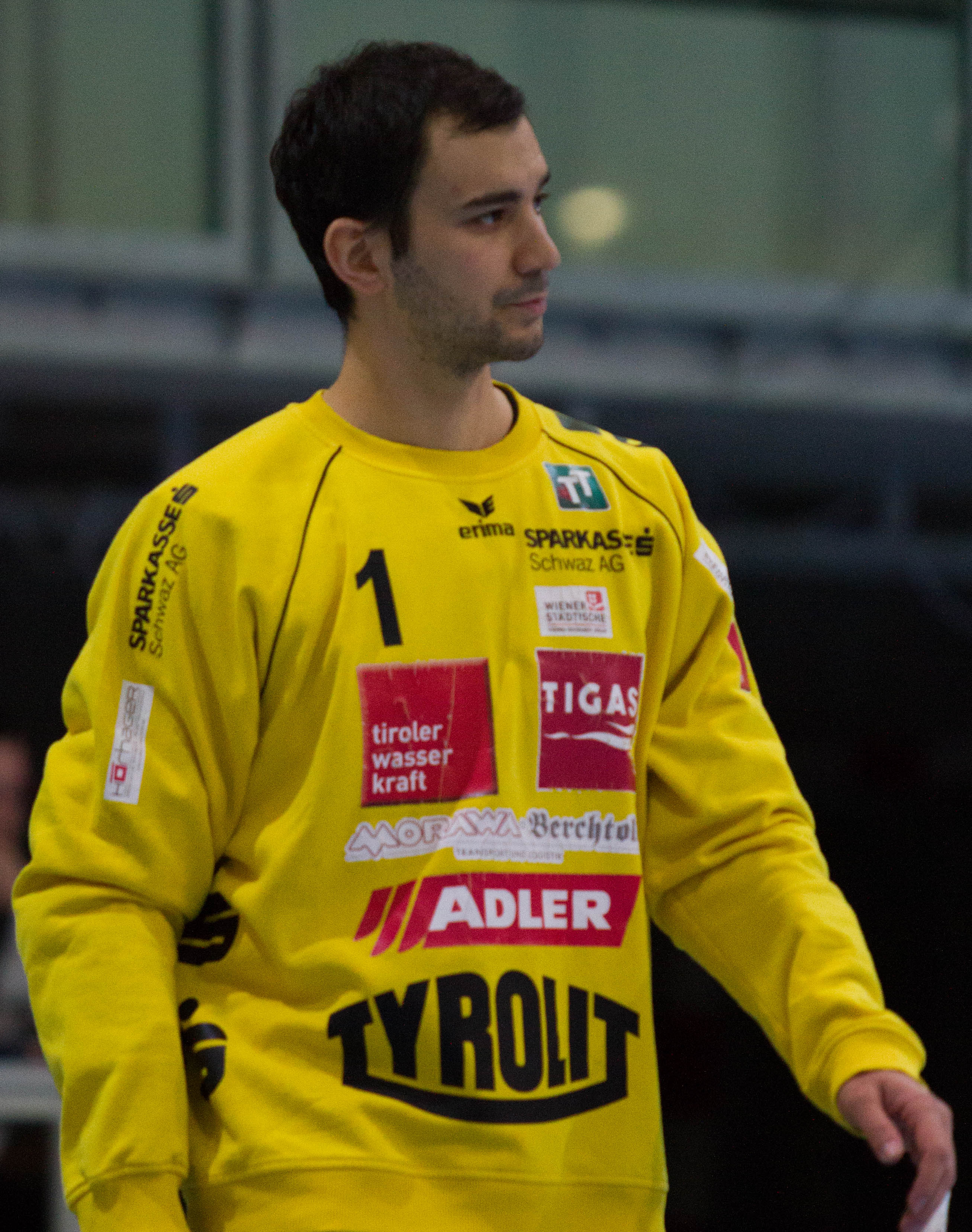 Christian Aigner